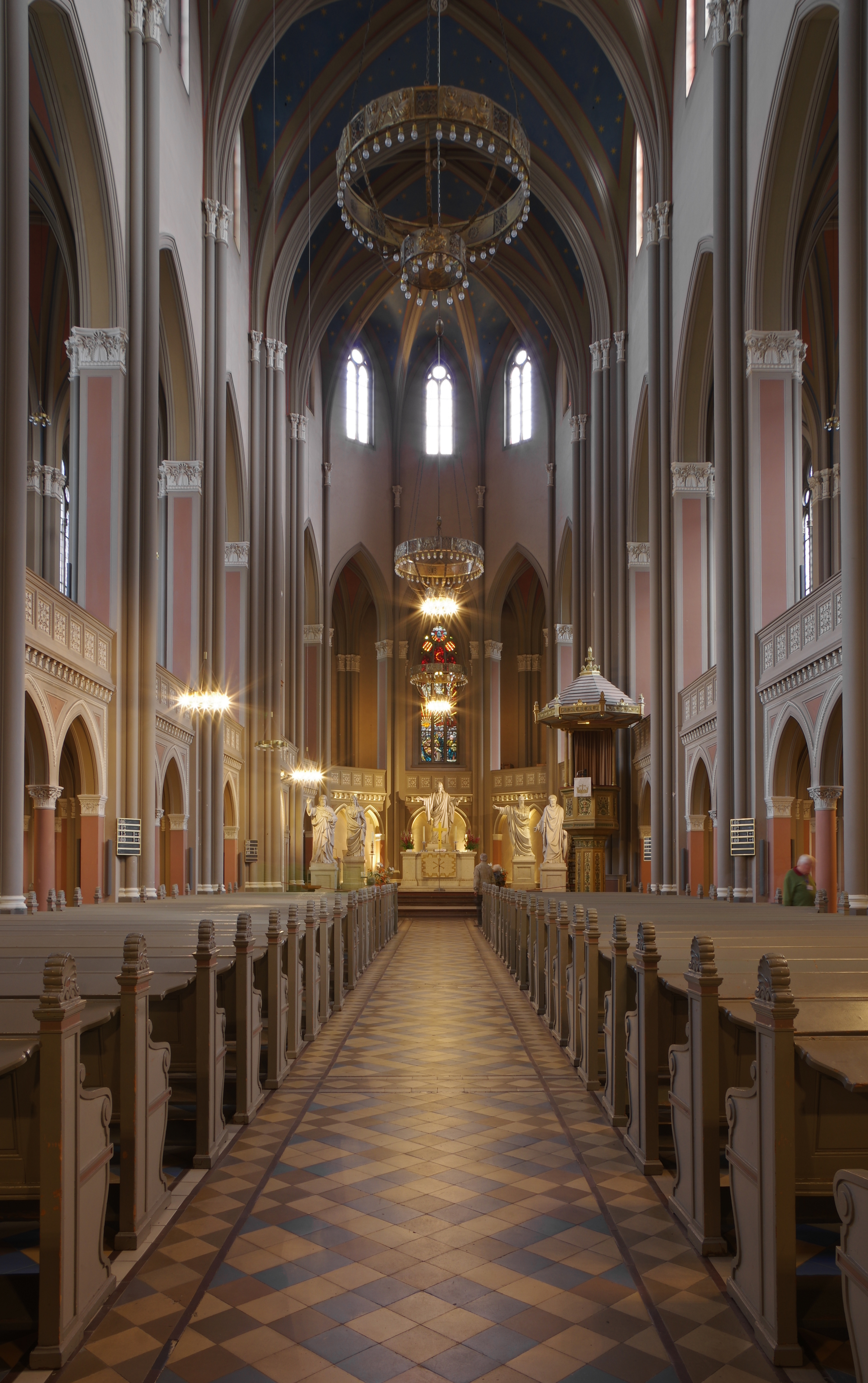 Deutschland, Wiesbaden, Marktkirche